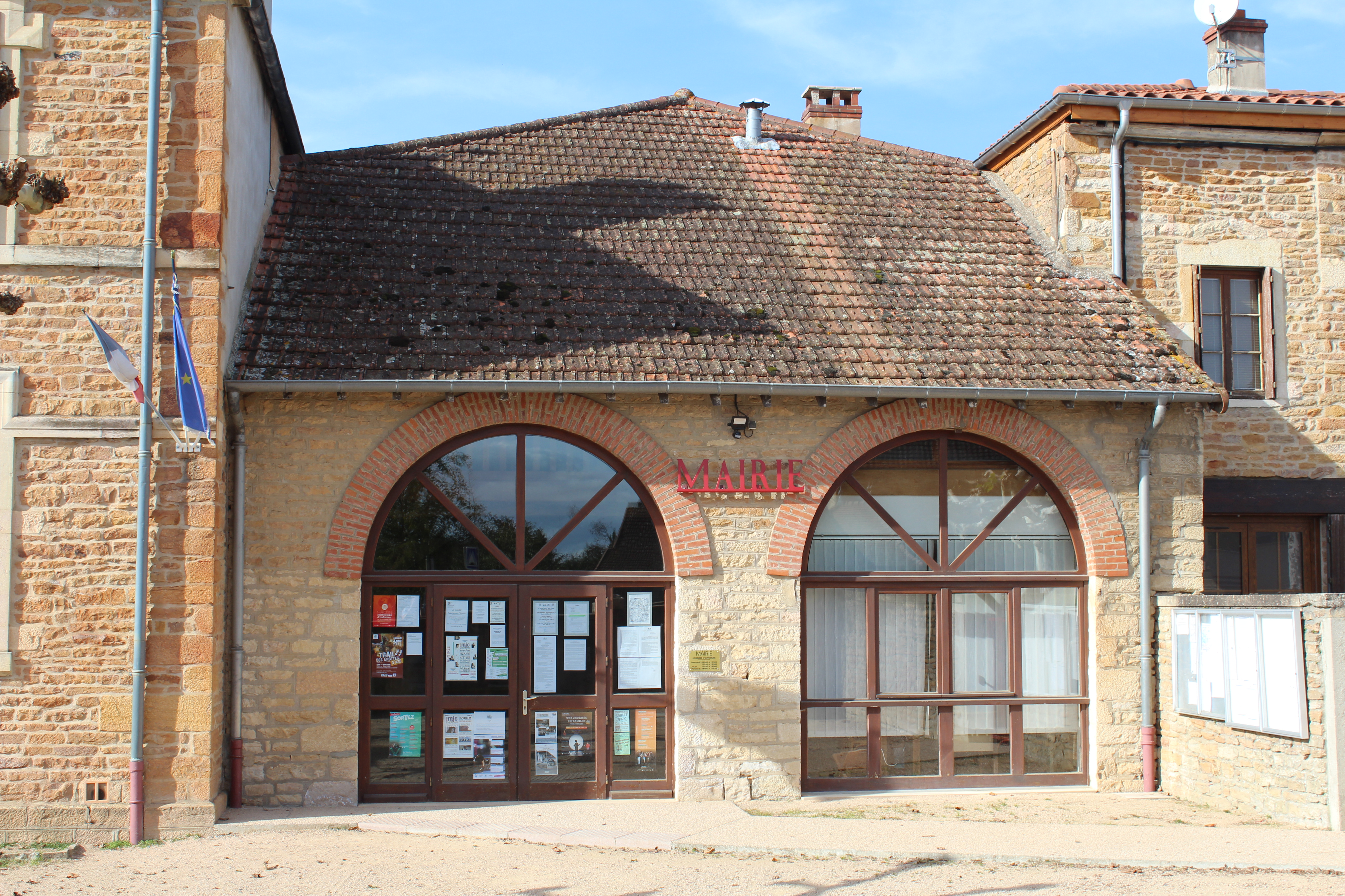 Mairie de Saint-Maurice-de-Satonnay.